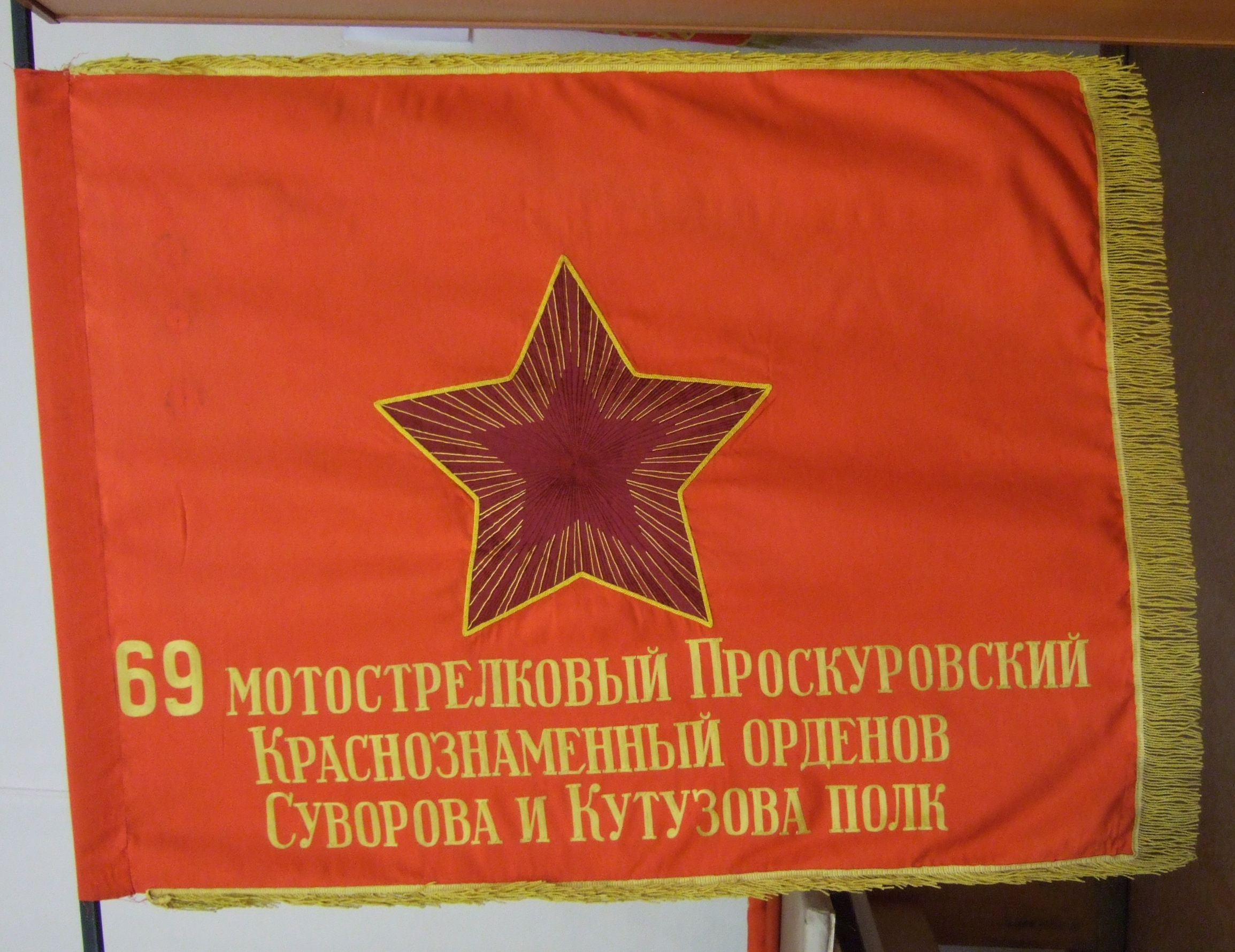 Боевое Знамя 69 мотострелкового полка Советской Армии, Аверс, фото сделано в Знамённом Фонде Центрального музея ВС